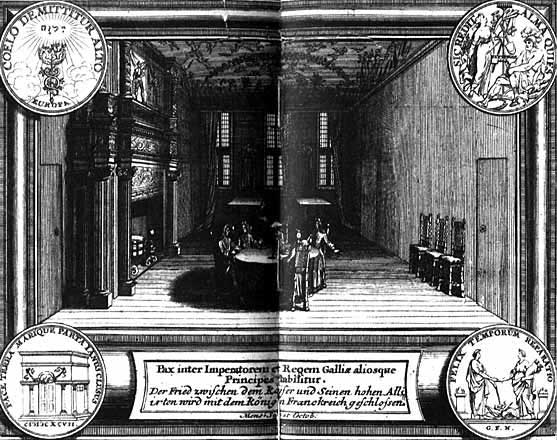 Kupferstich, zeitgenössisch: Friedensverhandlungen von Rijswik, 1697